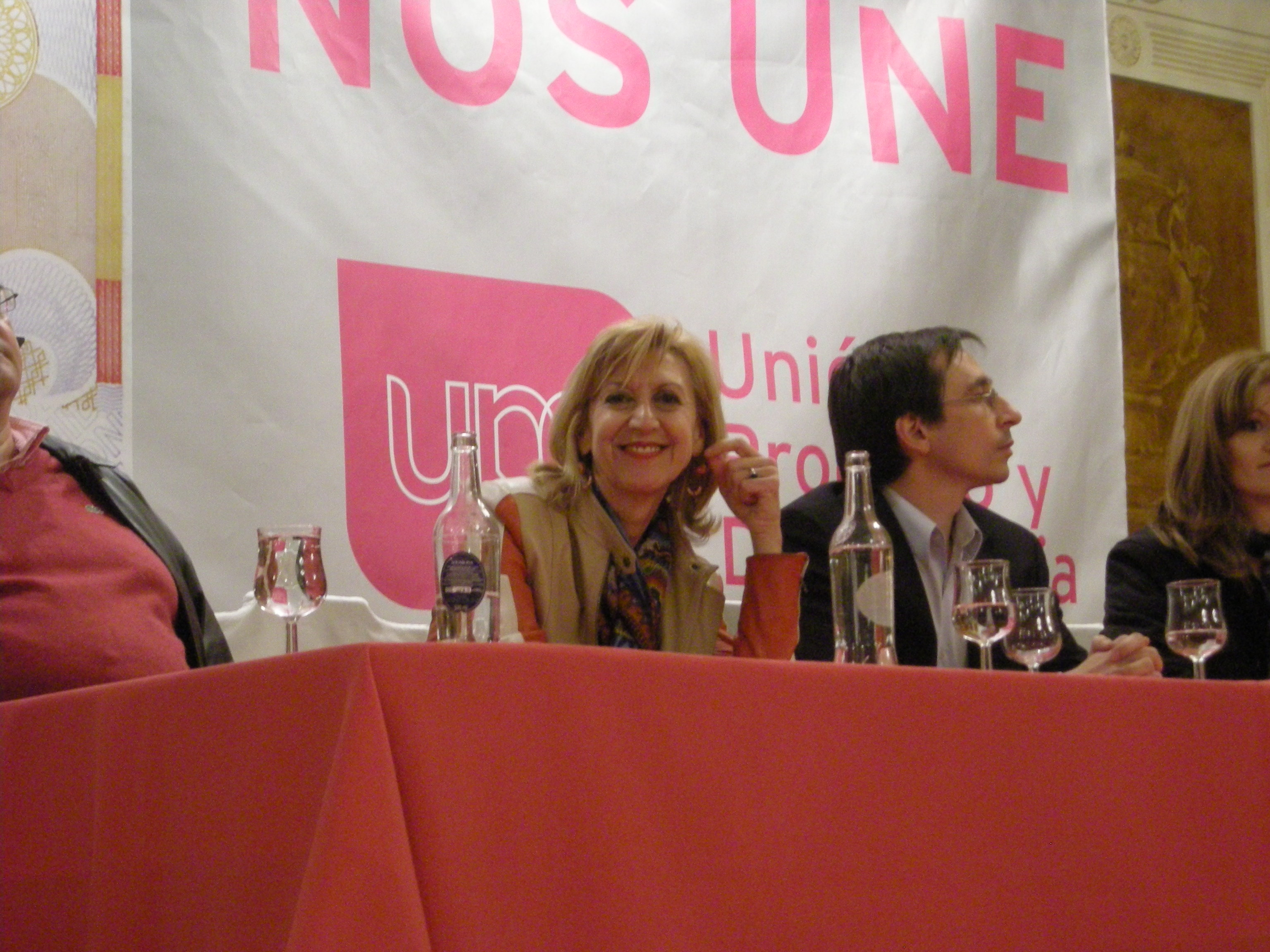 Rosa Diez en un acto en Mostoles